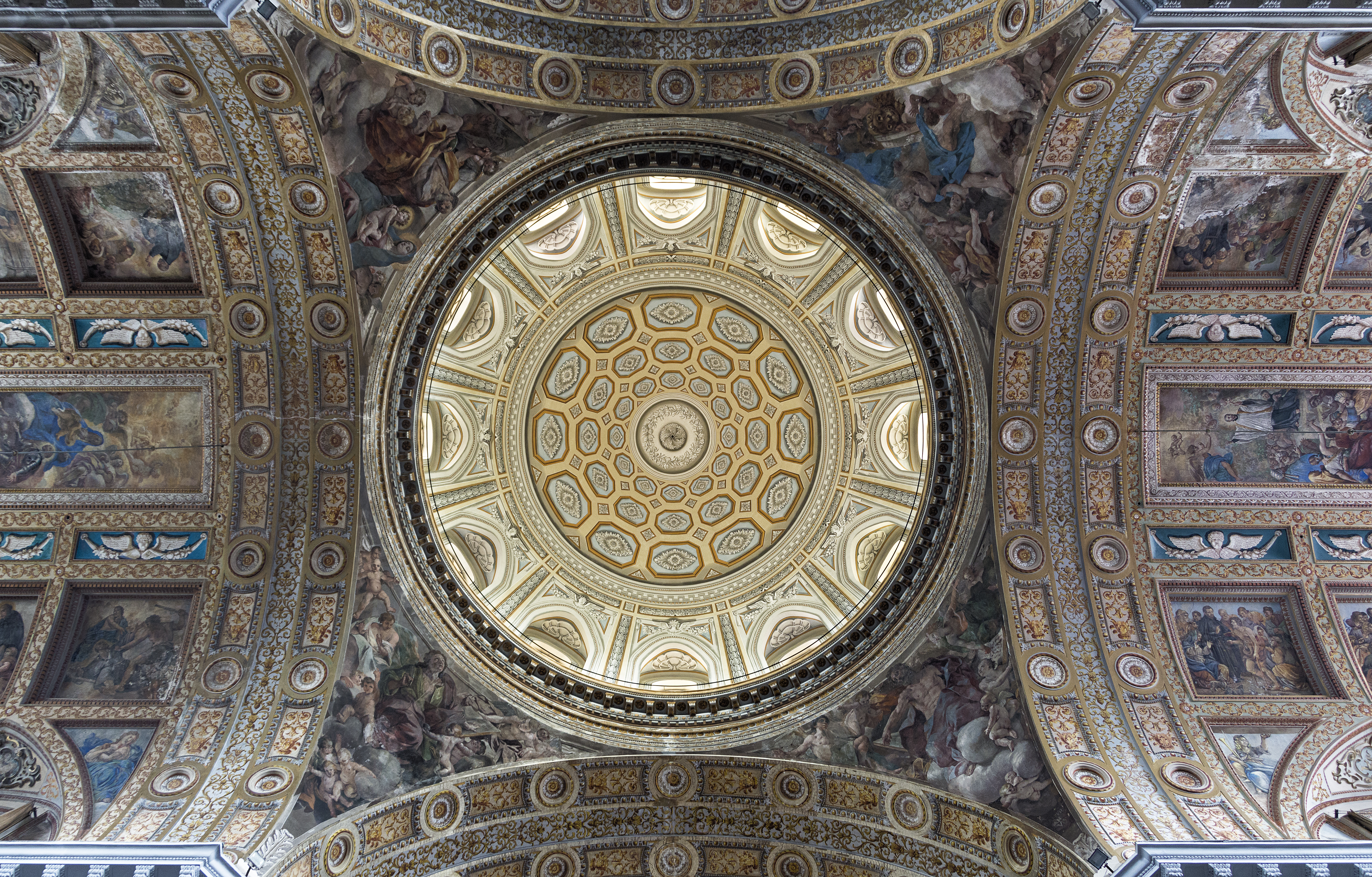 Cupola di Ignazio di Nardo.